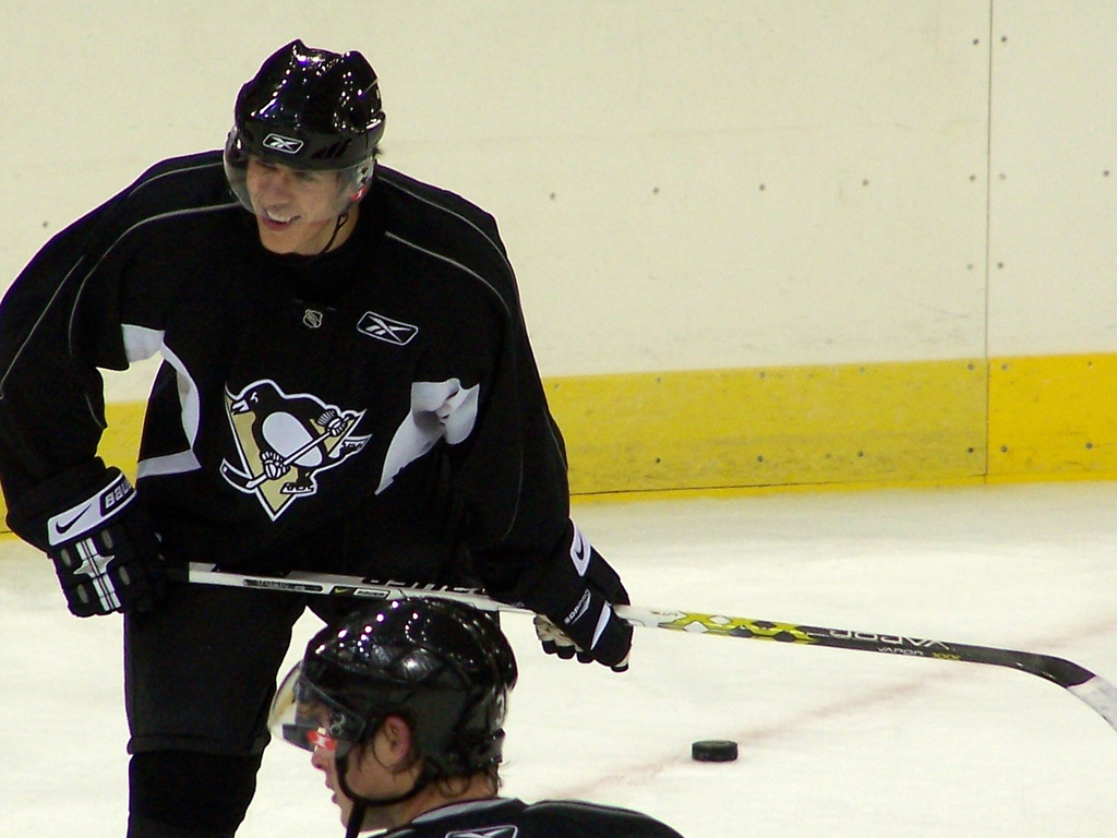 Evgeni_Malkin, Pittsburgh Penguins, USA